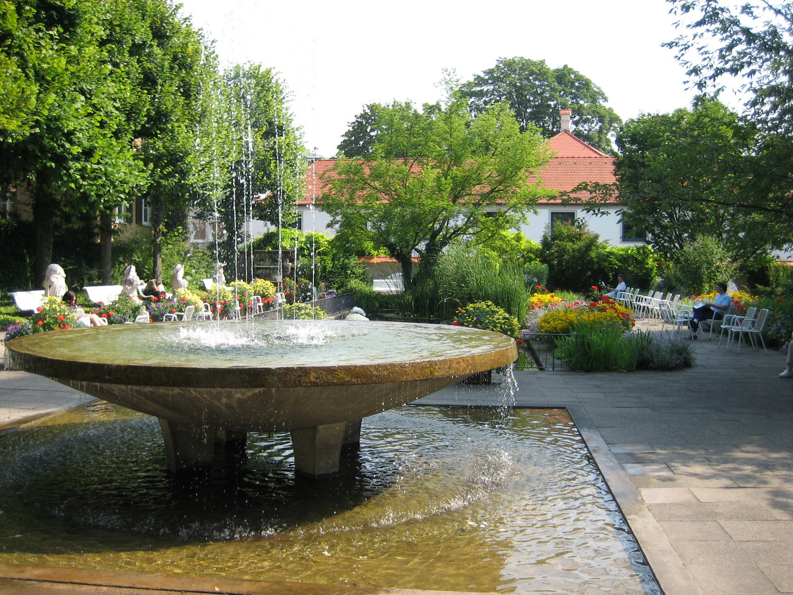 Hofgarten in Augsburg, Blick nach Osten